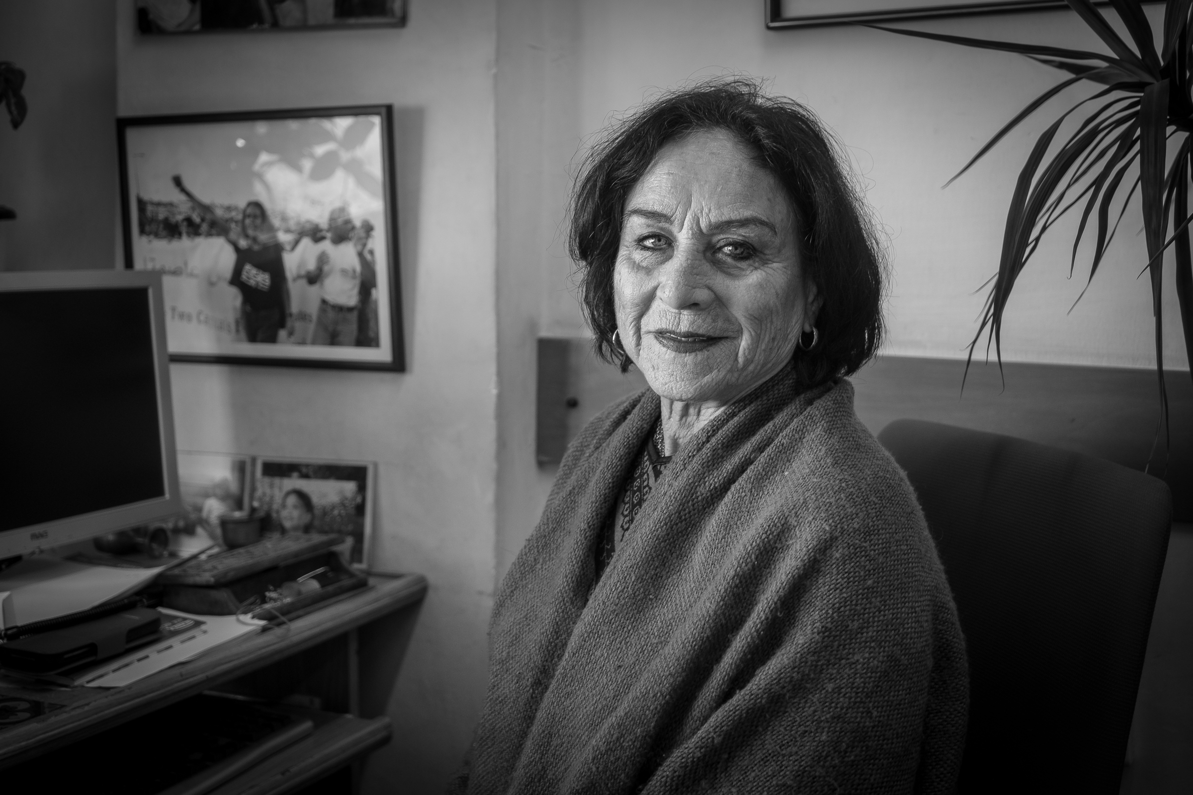 L’avocate israélienne Leah Tsemel en 2019